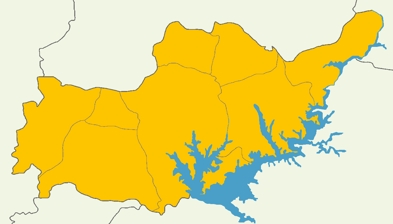 Adıyaman'da 2014 Türkiye cumhurbaşkanlığı seçimi sonuçları